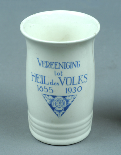 Jubileumbeker van de Vereeniging tot Heil des Volks bij hun 75-jarig jubileum (1855-1930). Beker van van wit zgn. Engels aardewerk met opschrift - in blauw - "Vereeniging tot Heil des Volks 1855-1930". Daaronder het embleem van de vereniging in een driehoek een klavertje vier met aan weerszijden en onder de vorm van een blad. De beker heeft onder vier banden en ribbels en loopt naar boven bij de hals eerst smal dan breder toe aan onderzijde stempel van de Sphinx fabrieken te Maastricht (een liggende sphinx). Producent: NV De Sphinx v/h Petrus Regout & Co, Maastricht, 1930. Collectie: CODA Museum, Apeldoorn.